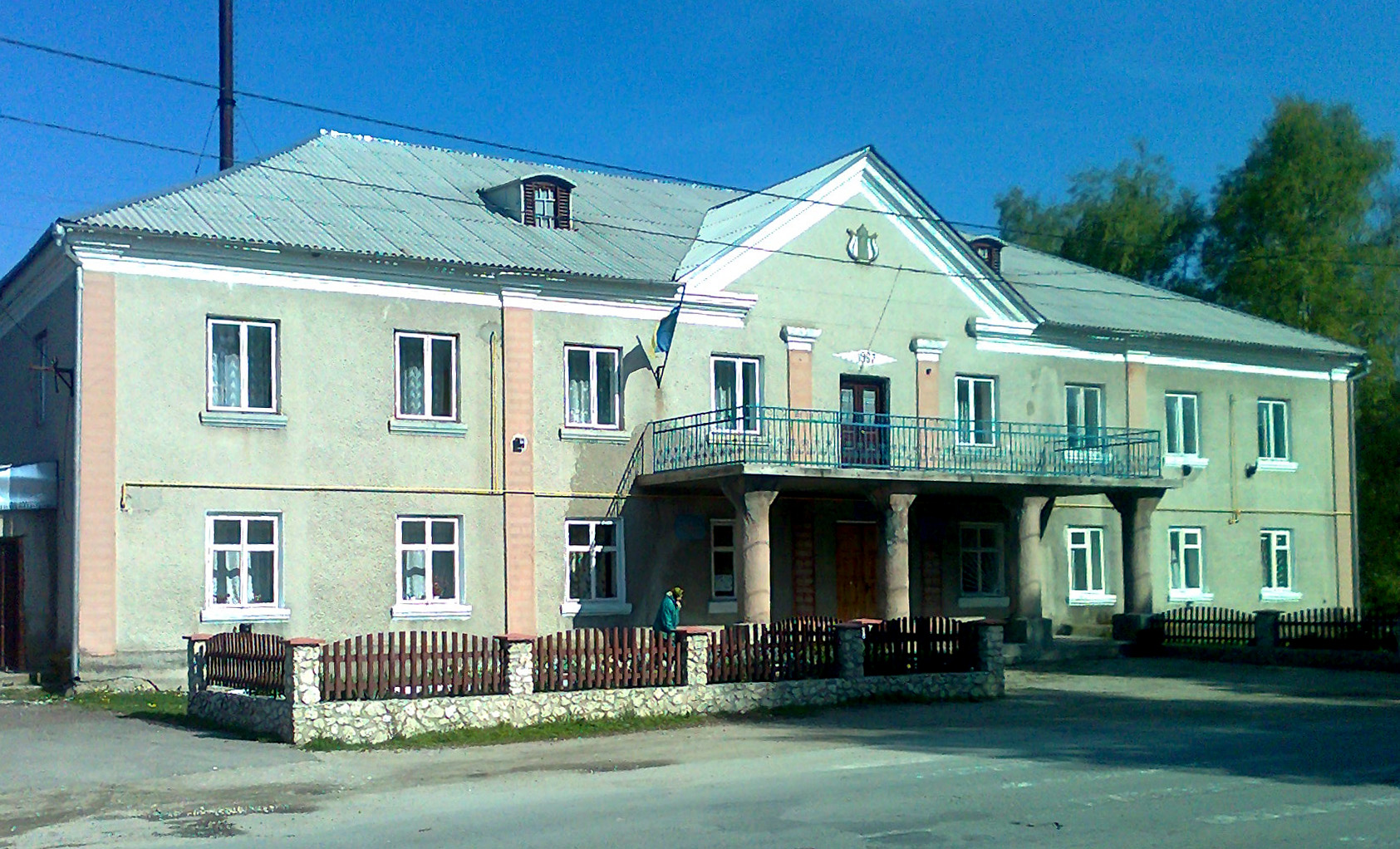 ГАЇ.БУДИНОК КУЛЬТУРИ